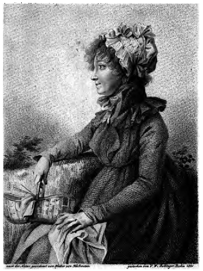 Neue vermischte Gedichte von Susanne von Bandemer .